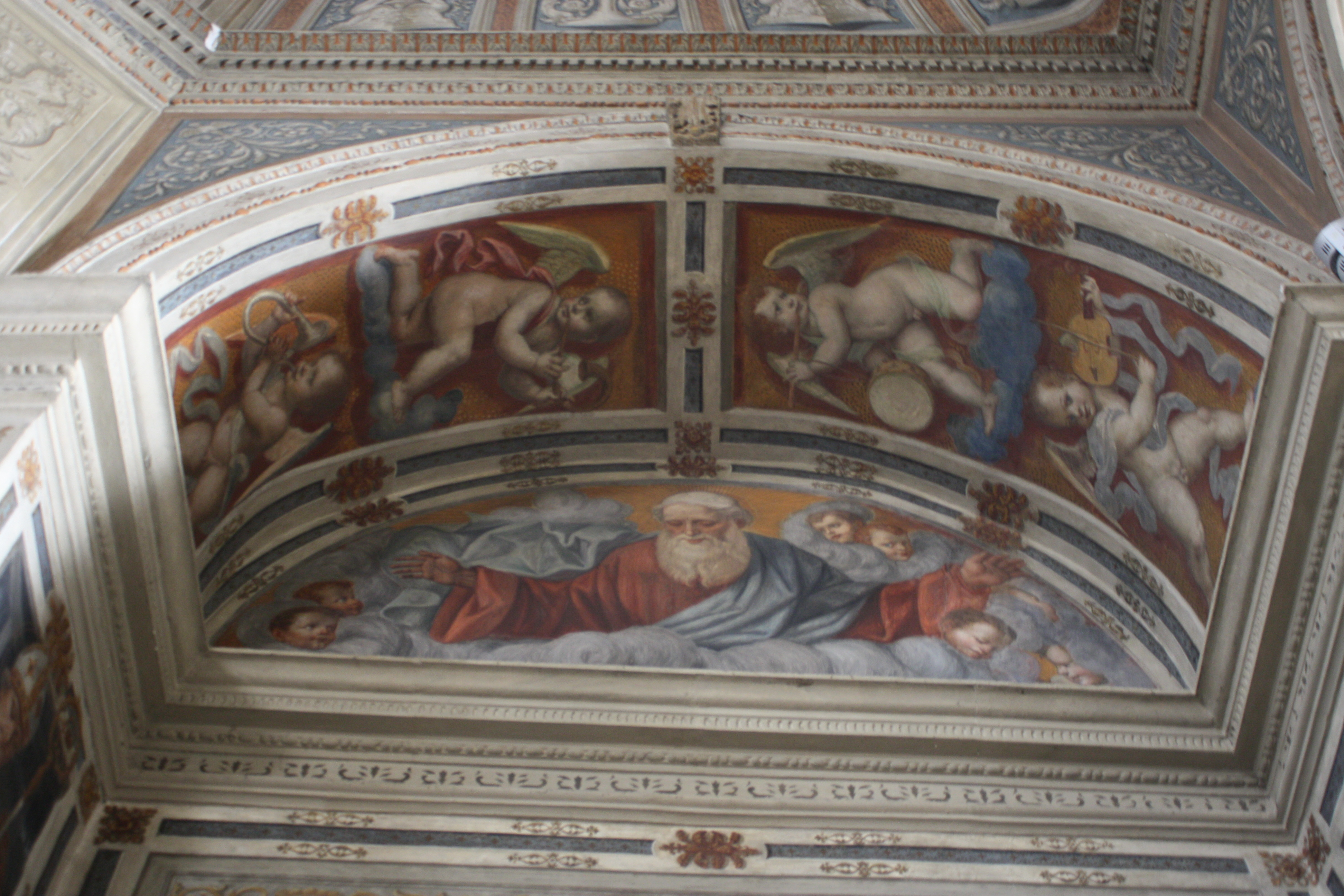 L'interno della basilica di San Magno a Legnano - Cappella di San Pietro Martire - Affresco dell'inizio del 1900 opera di Gersam Turri che raffigura il Padre Eterno che benedice allargando le braccia.